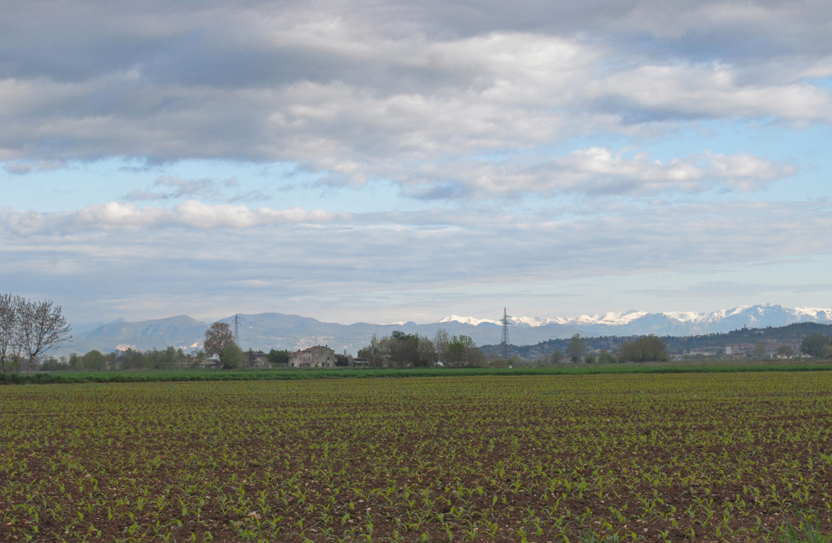 Campagna di Medole.